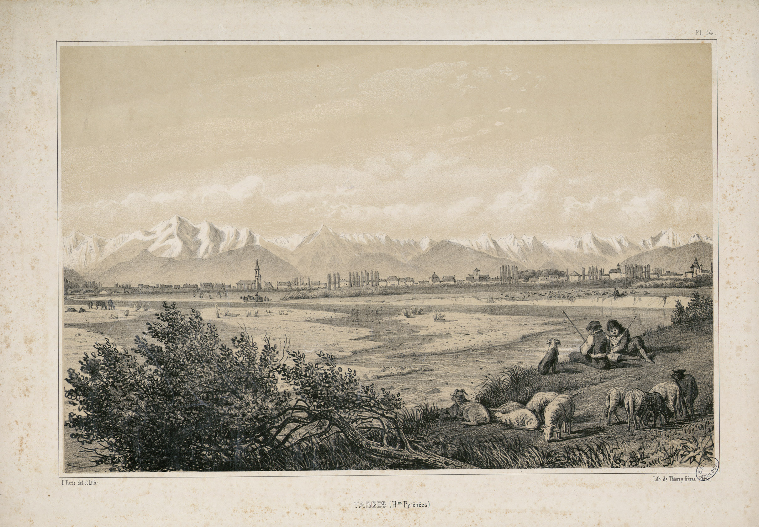 Fait partie d'un recueil de 12 lithographies imprimées par Thierry frères Ancely, René (1876 - 1966). Possesseur